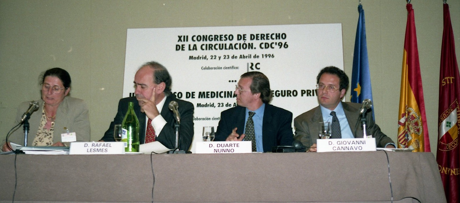 Madrid 2006